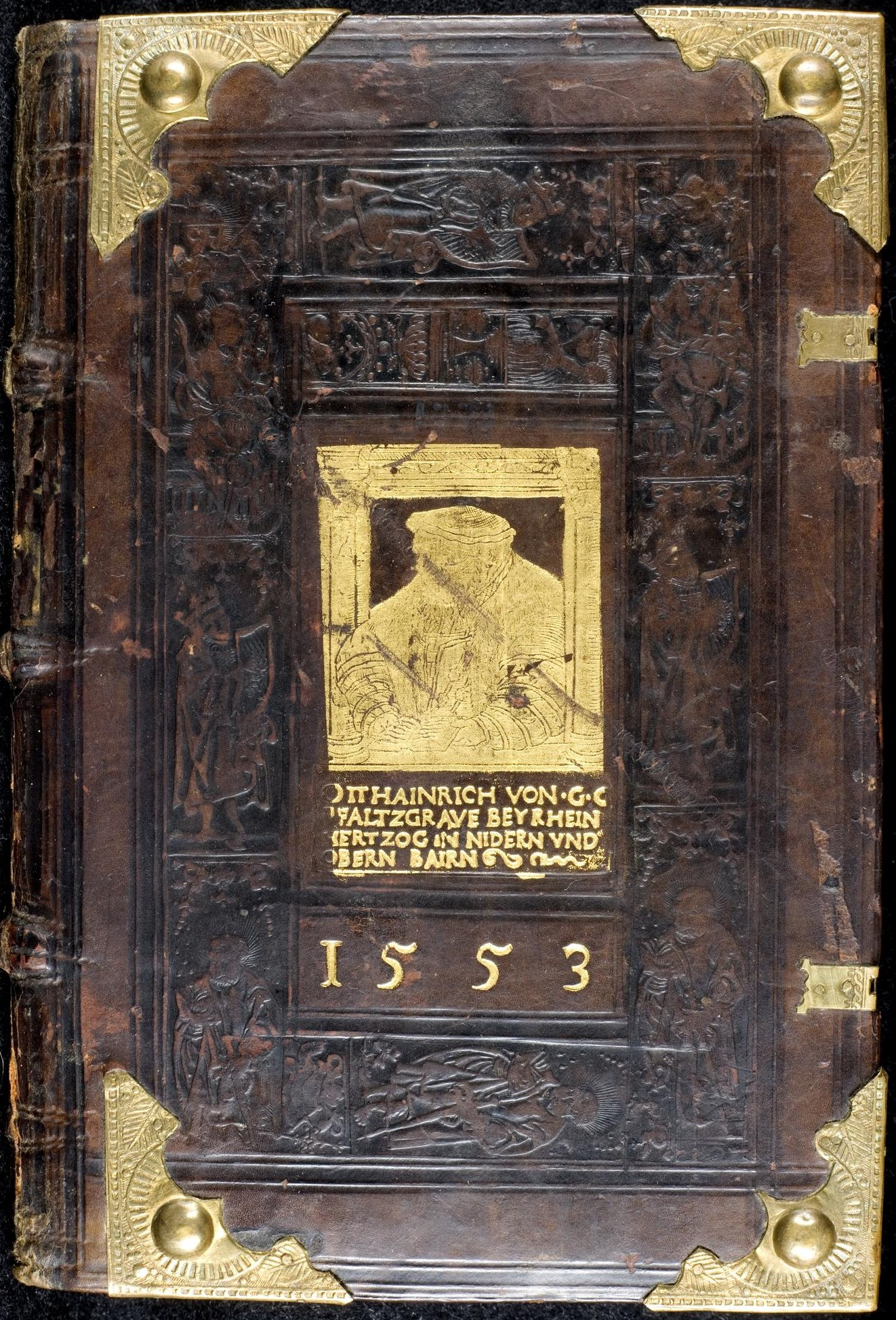 Codex Palatinus germanicus 10, Einband ("Ottheinrich-Einband"), Vorderdeckel: vergoldete Platte mit Bildnis Ottheinrichs, des Pfalzgrafen bei Rhein. Inschrift: OTTHAINRICH VON. G. G. // PFALTZGRAVE BEY RHEIN // HERTZOG IN NIDERN VND // OBERN BAIRN. Jahreszahl: 1553.